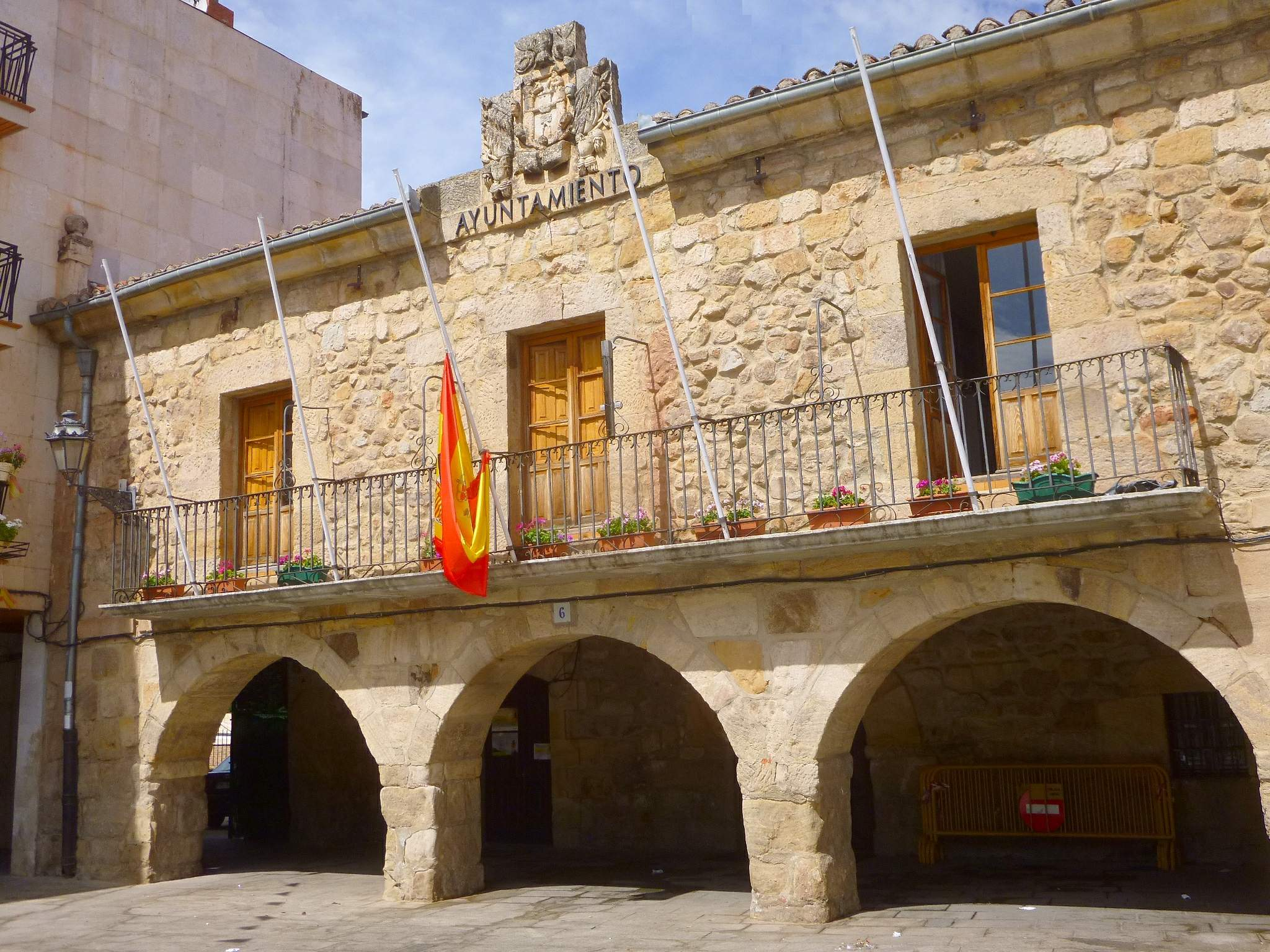 Ayuntamiento de Salas de los Infantes (Burgos)